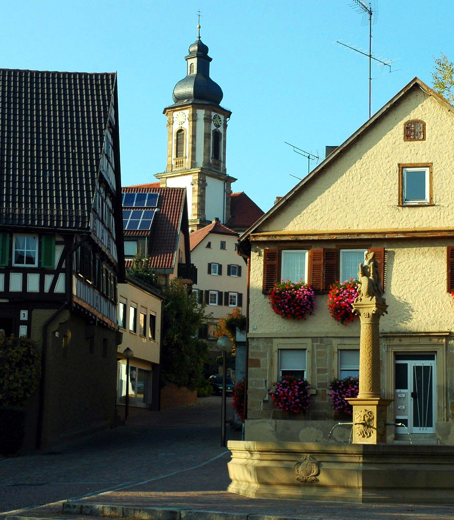 Marktplatz in Erlenbach mit der katholischen Kirche St. Martinus